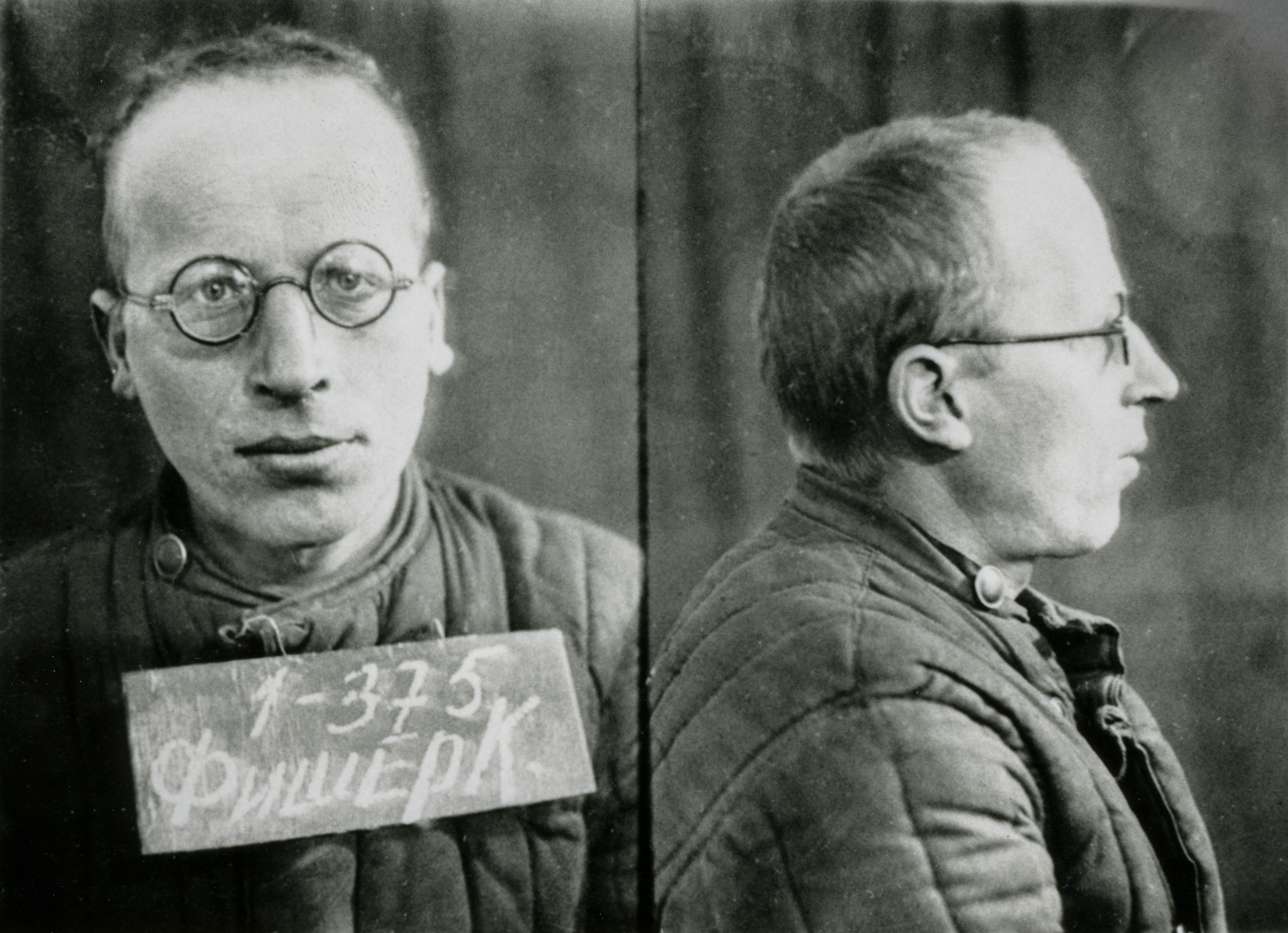 Karl Fischer als sowjetischer Häftling; Foto aus dem Personalakt des NKWD über Karl Fischer (Signatur: Fond 461/p, Akten-Nr. 190278) im Sonderarchiv Moskau